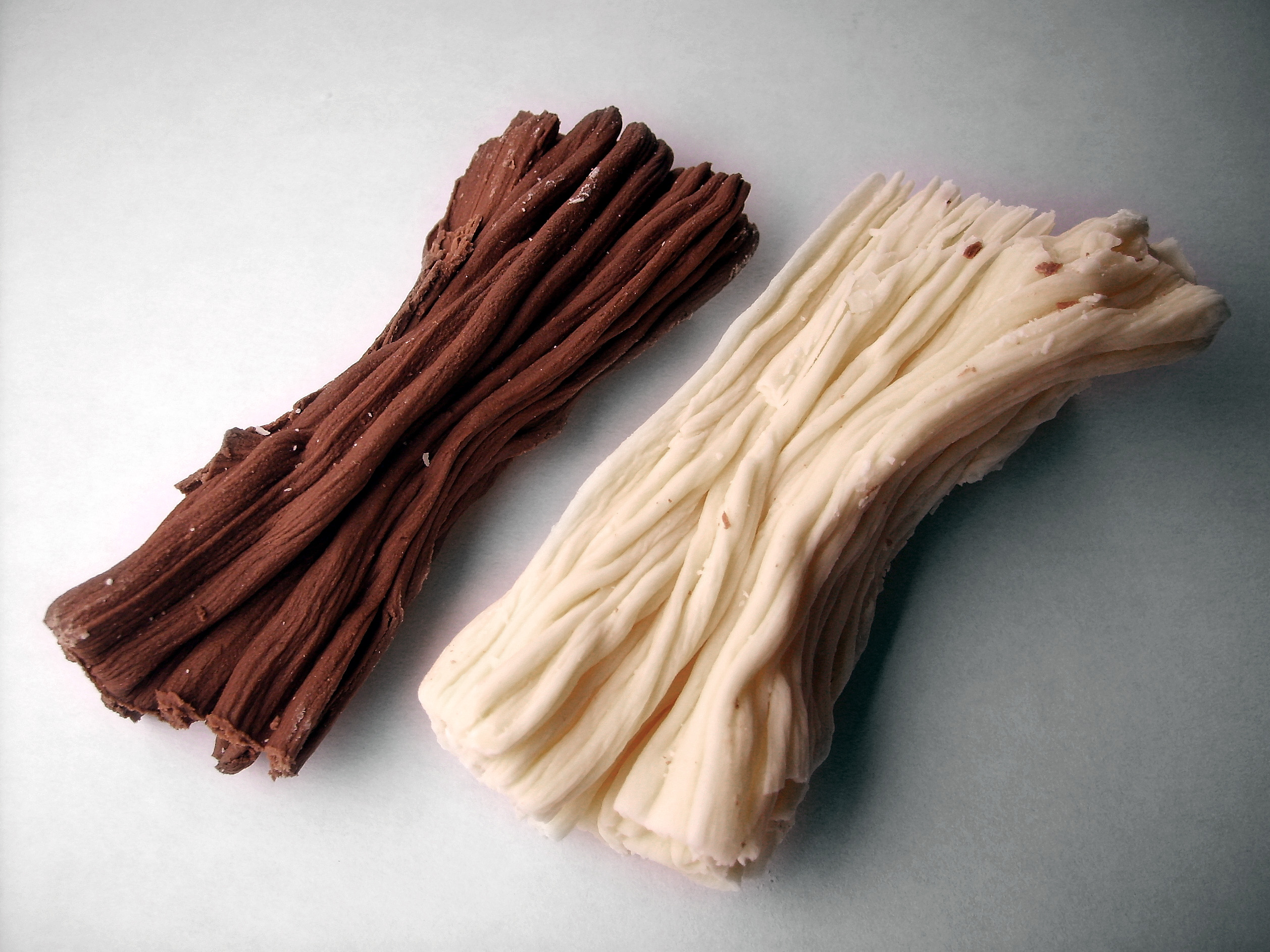 Chocolate negro y blanco en ramas.